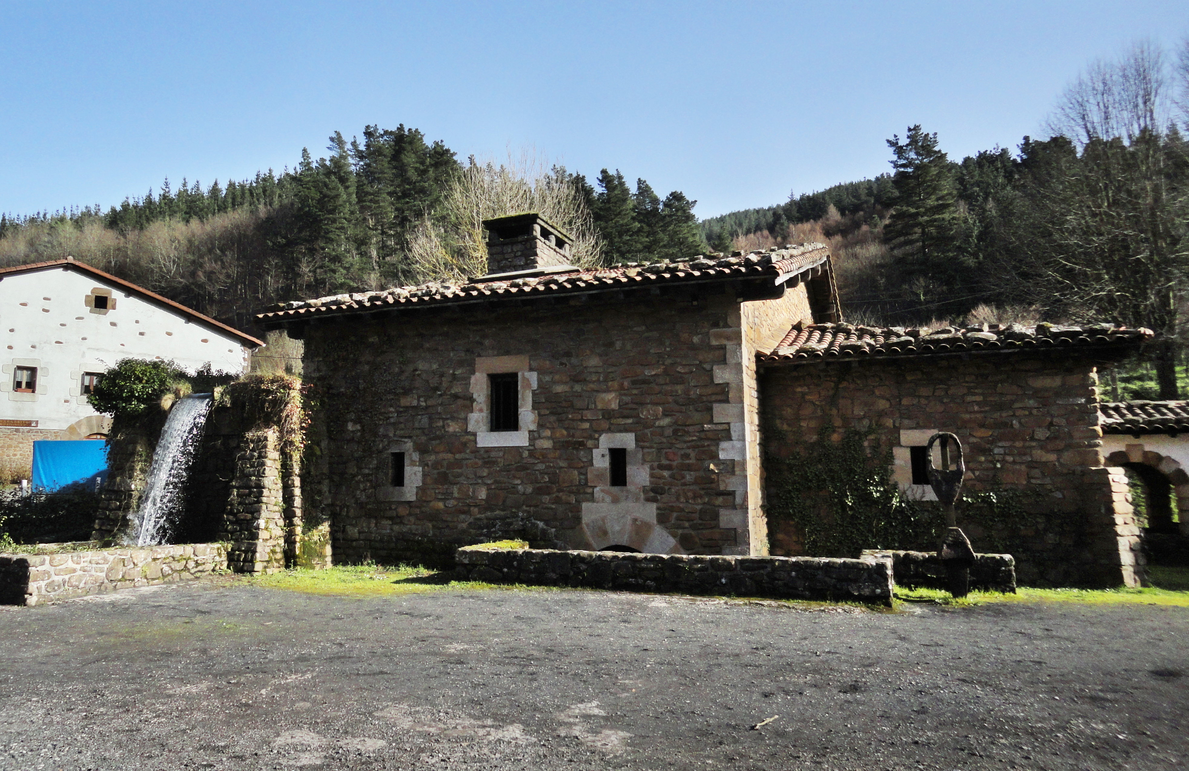 Mirandaola burdinola - Legazpi